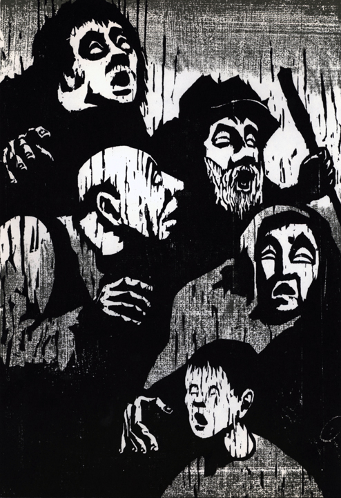 Print